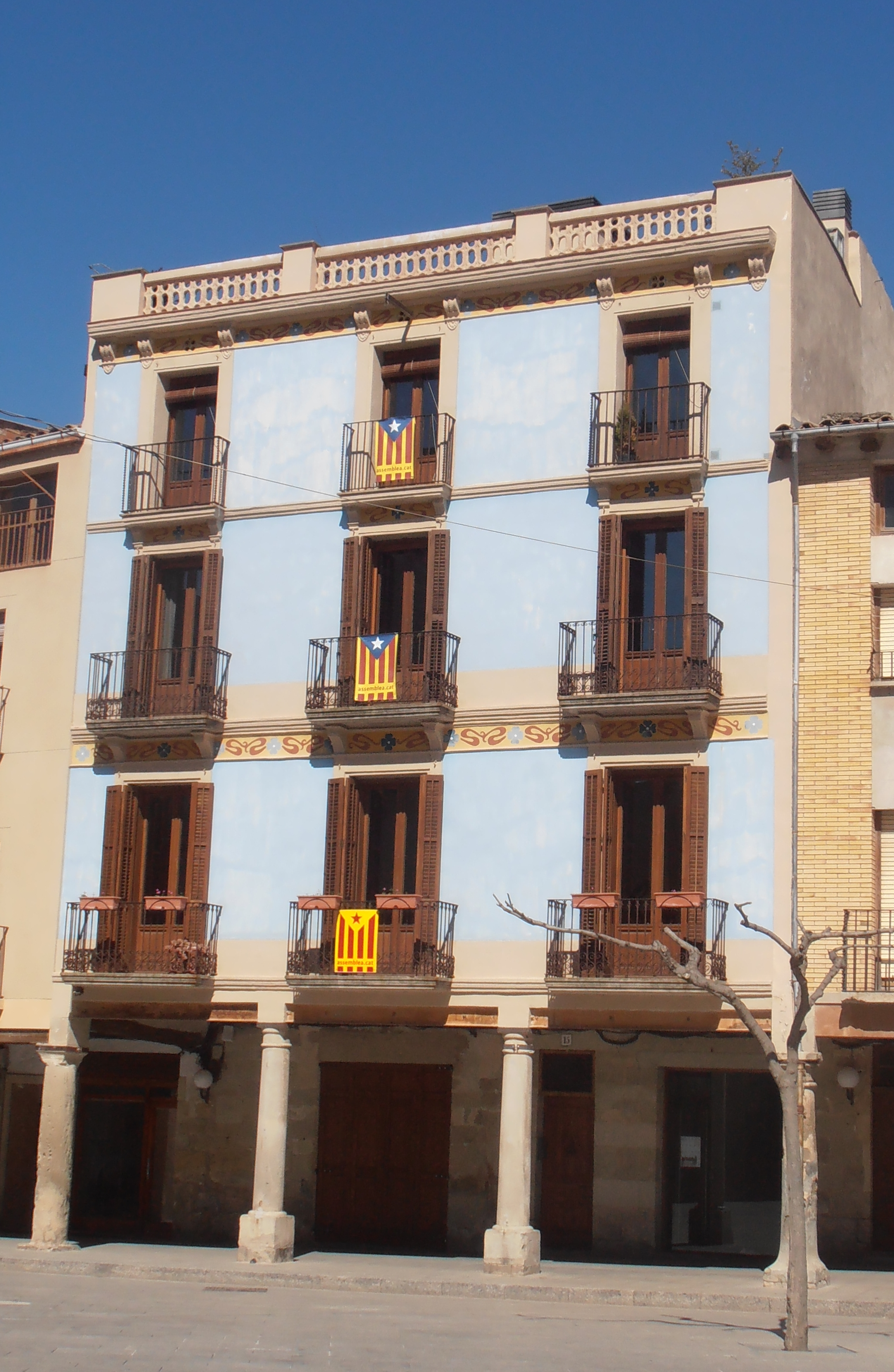 Edifici Modernista (antigament Cal Molí) a la Plaça Major de Santa Coloma de Queralt